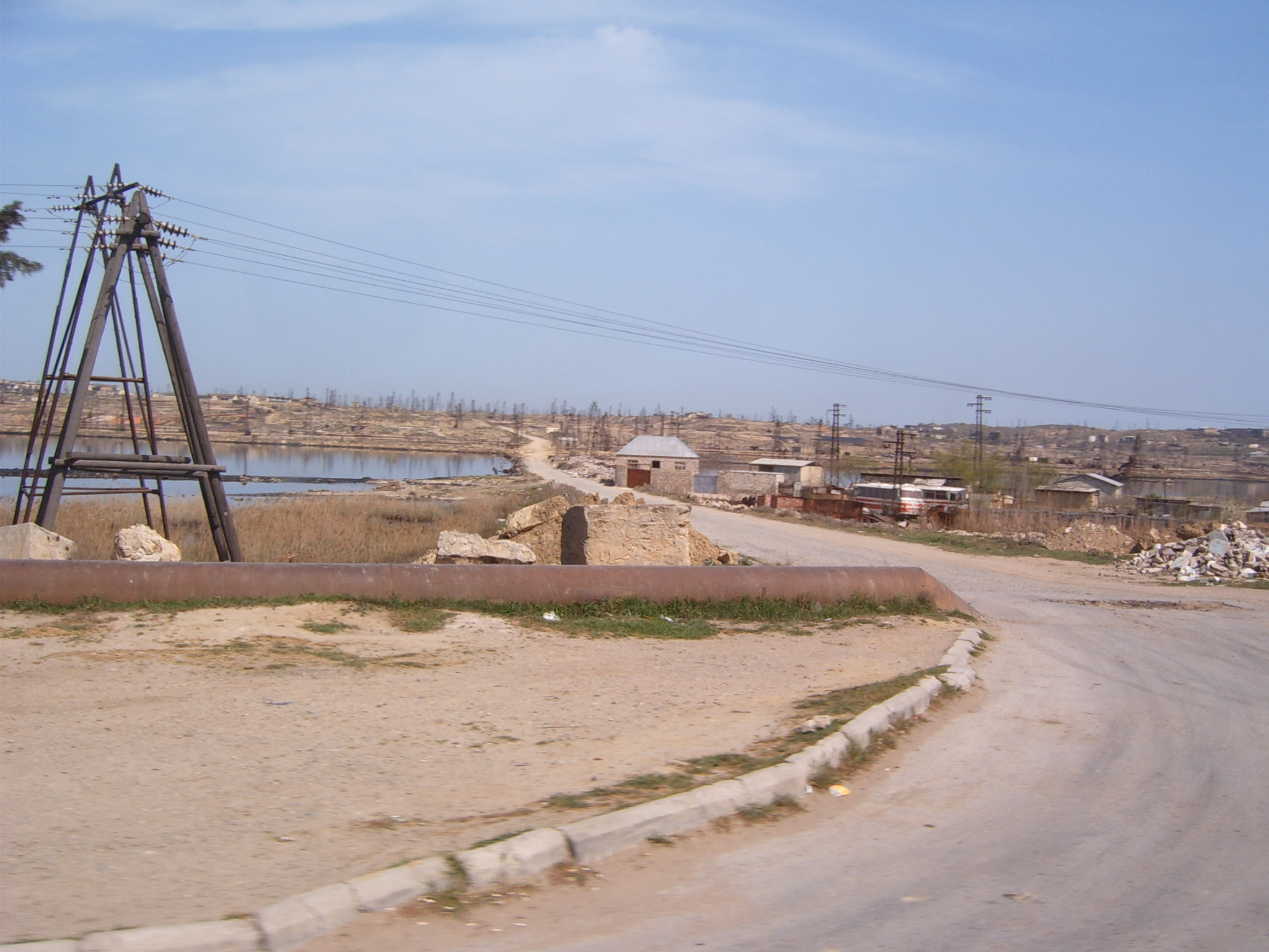 Oil field on the outskirts of Baku Srpski: Naftno polje na rubu Bakua